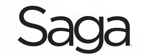 Logotipo da revista em quadrinhos Saga